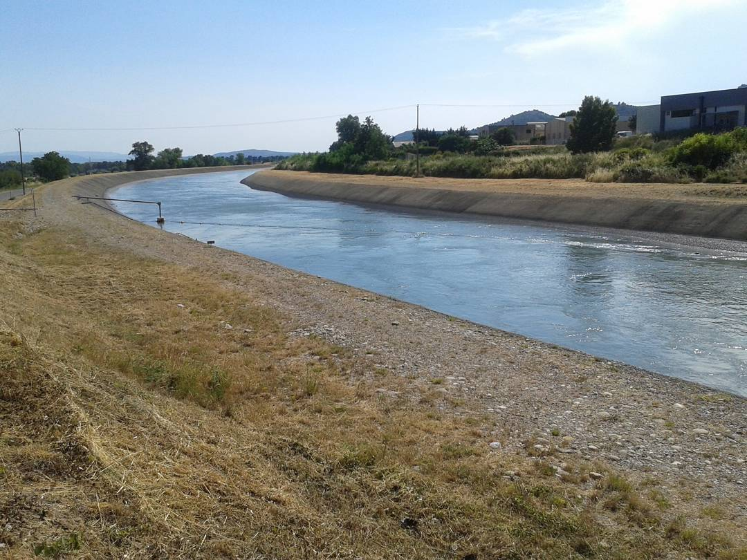 Canal usinier de la Durance